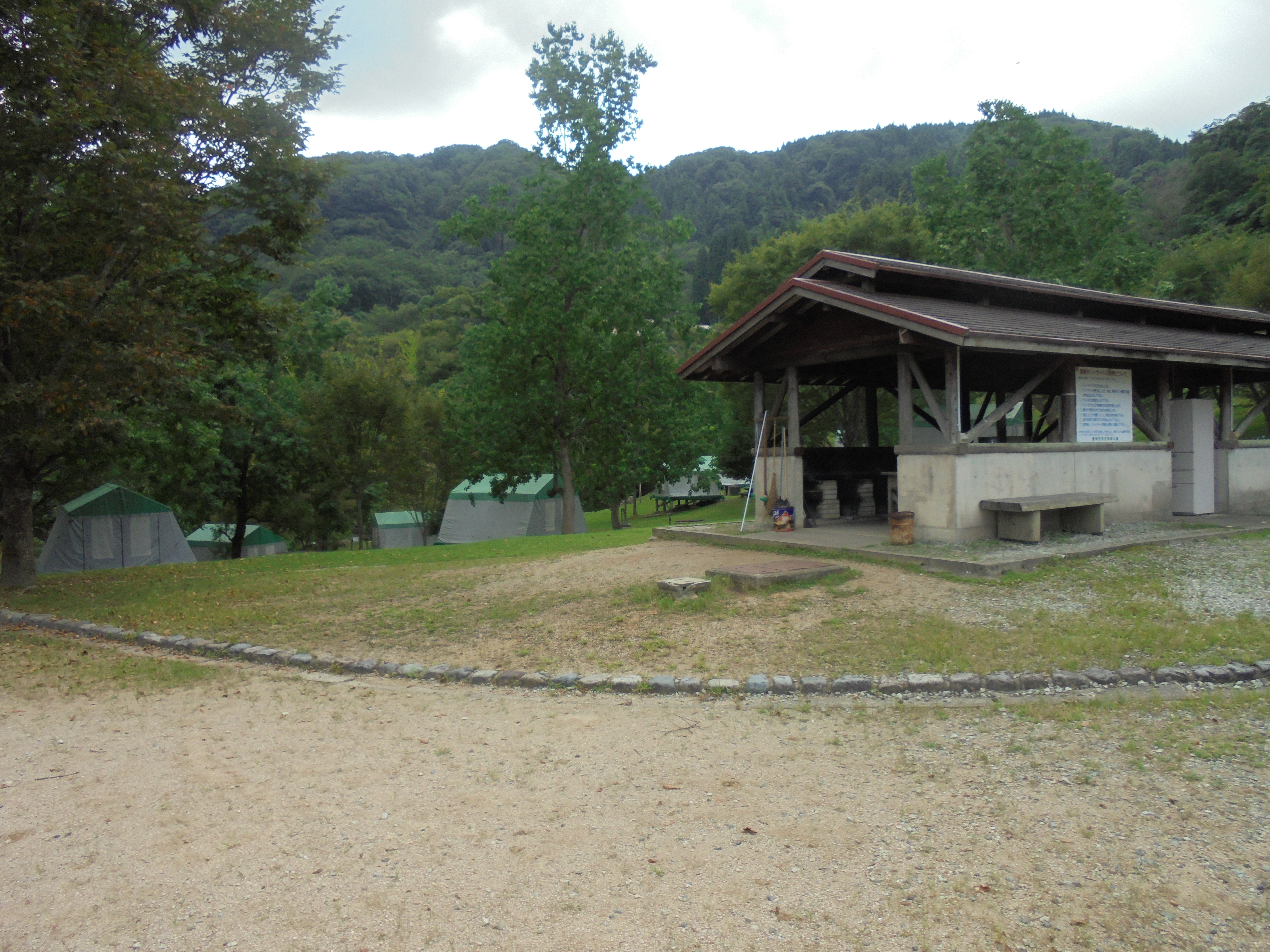 奈佐森林公園